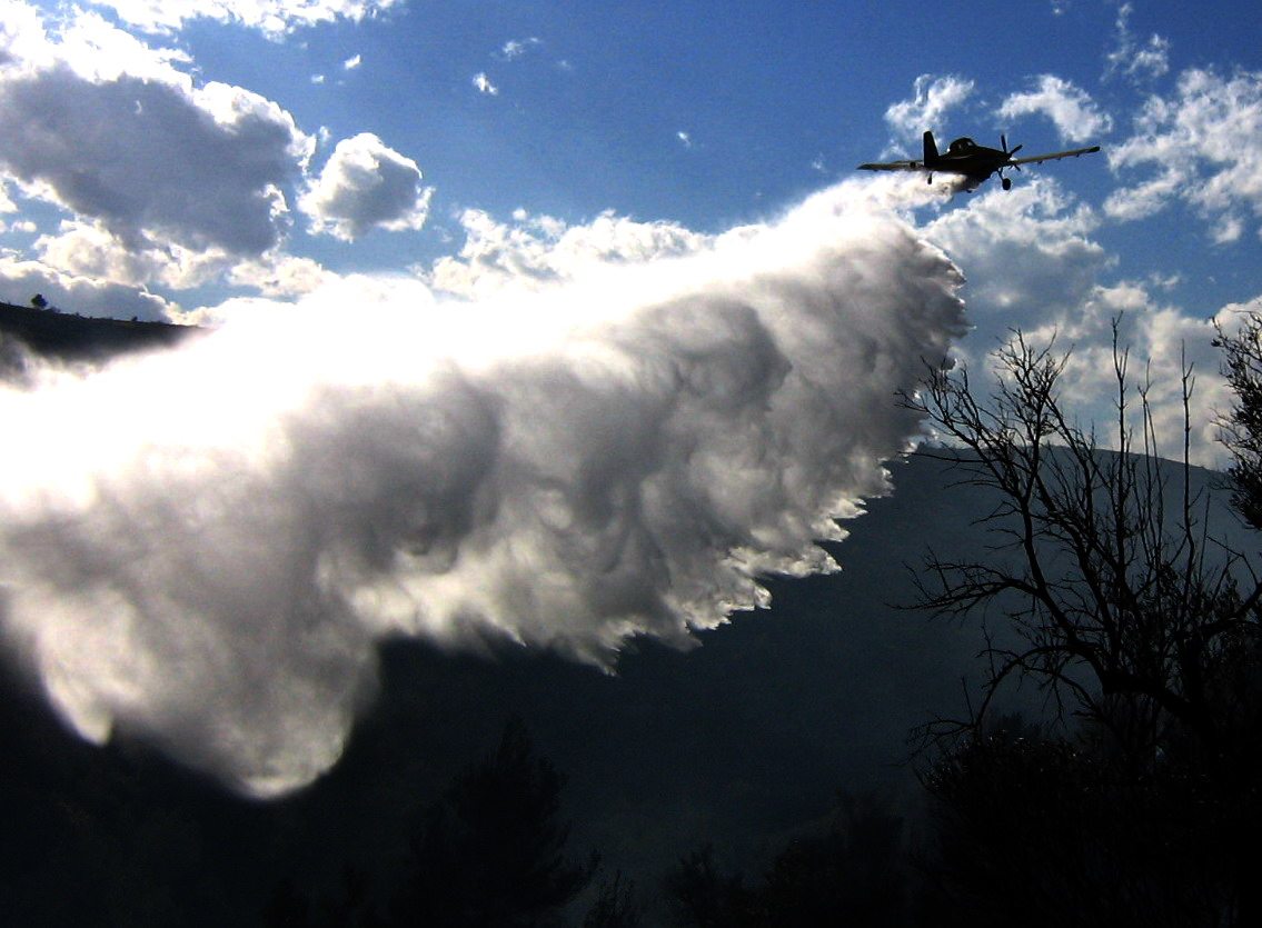 Descarga de medios aéreos en incendios forestales. bomberos